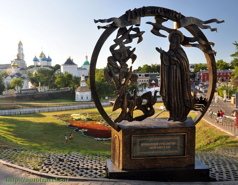 Чудо о птицах1